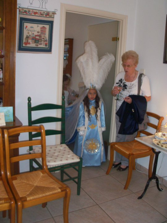 la pucelette de 2012